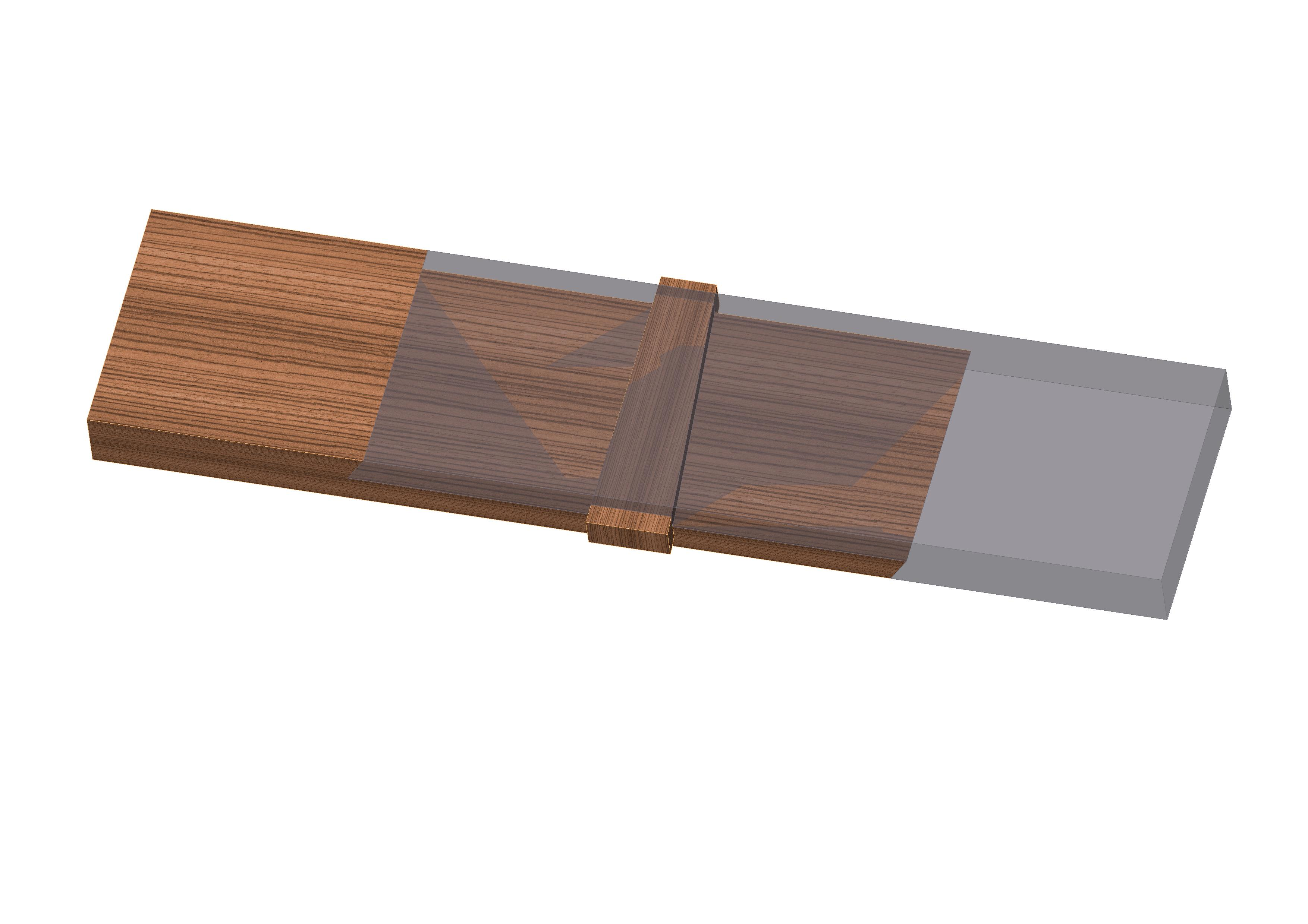 Holz-Längsverbindungen Deutscher Keil (Keilverbindungen) siehe Holzverbindung.